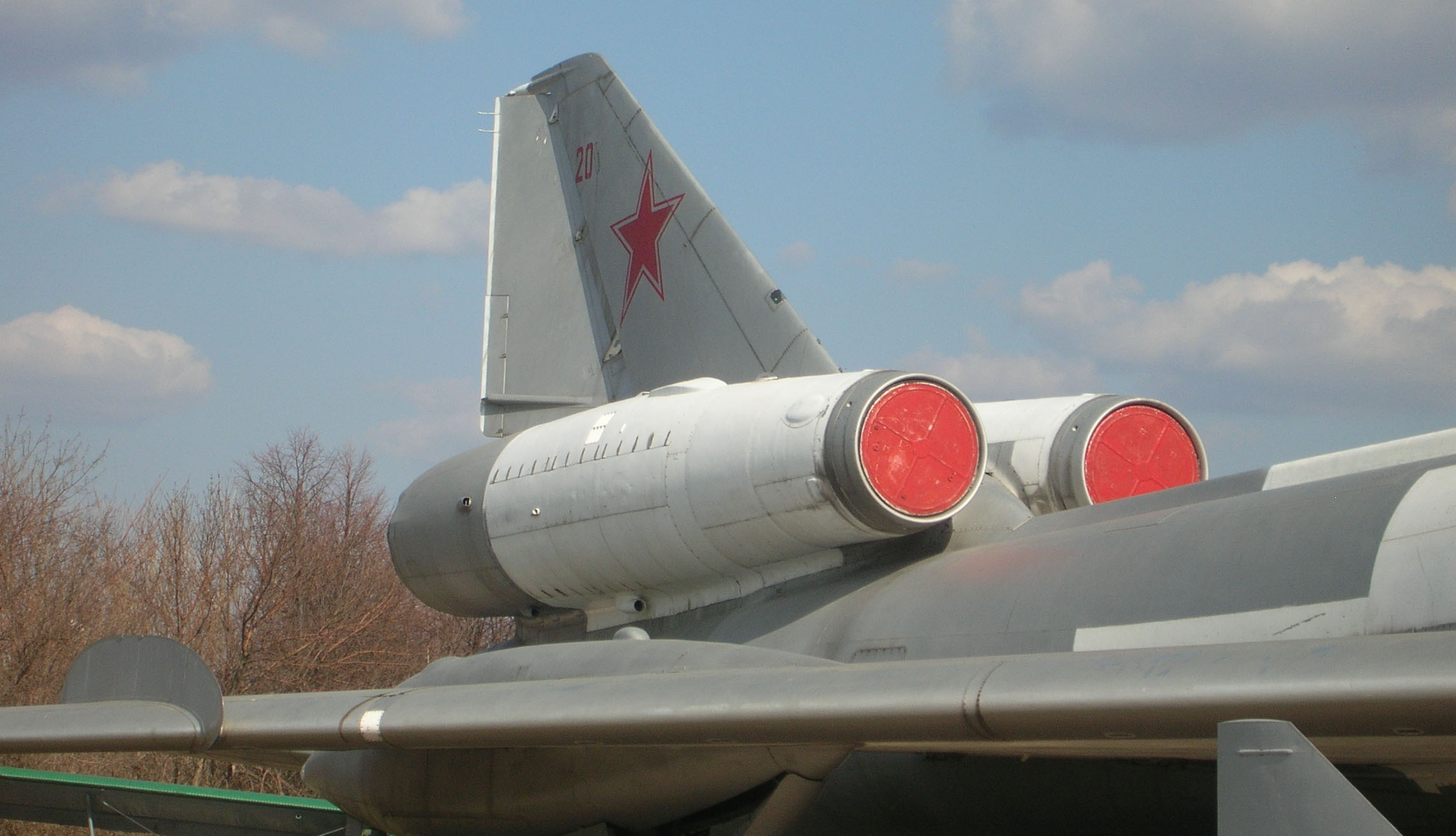 Хвостовая часть бомбардировщика Ту-22. Парк Победы, г. Саратов.